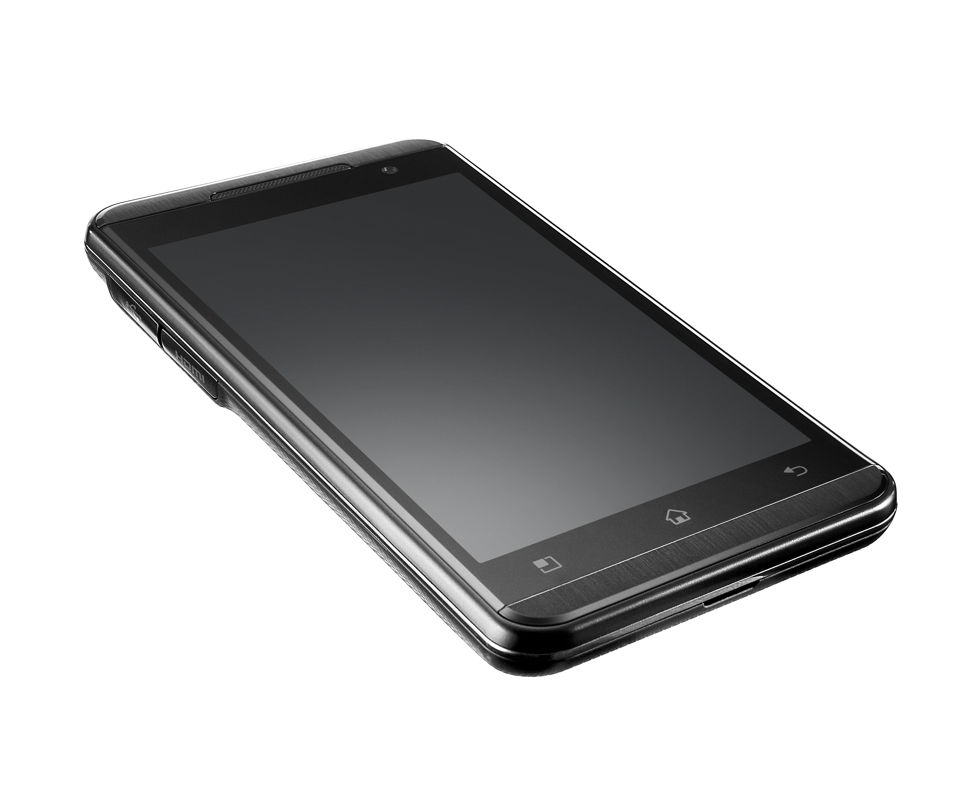 LG 옵티머스 3D 제품사진 모음